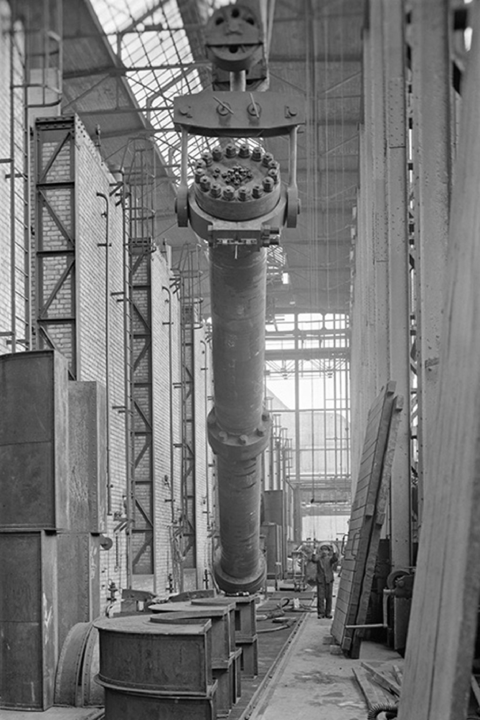 BASF-Negativnummer 1795-alt, Montage eines Hochdruckofens der Ammoniakanlage I